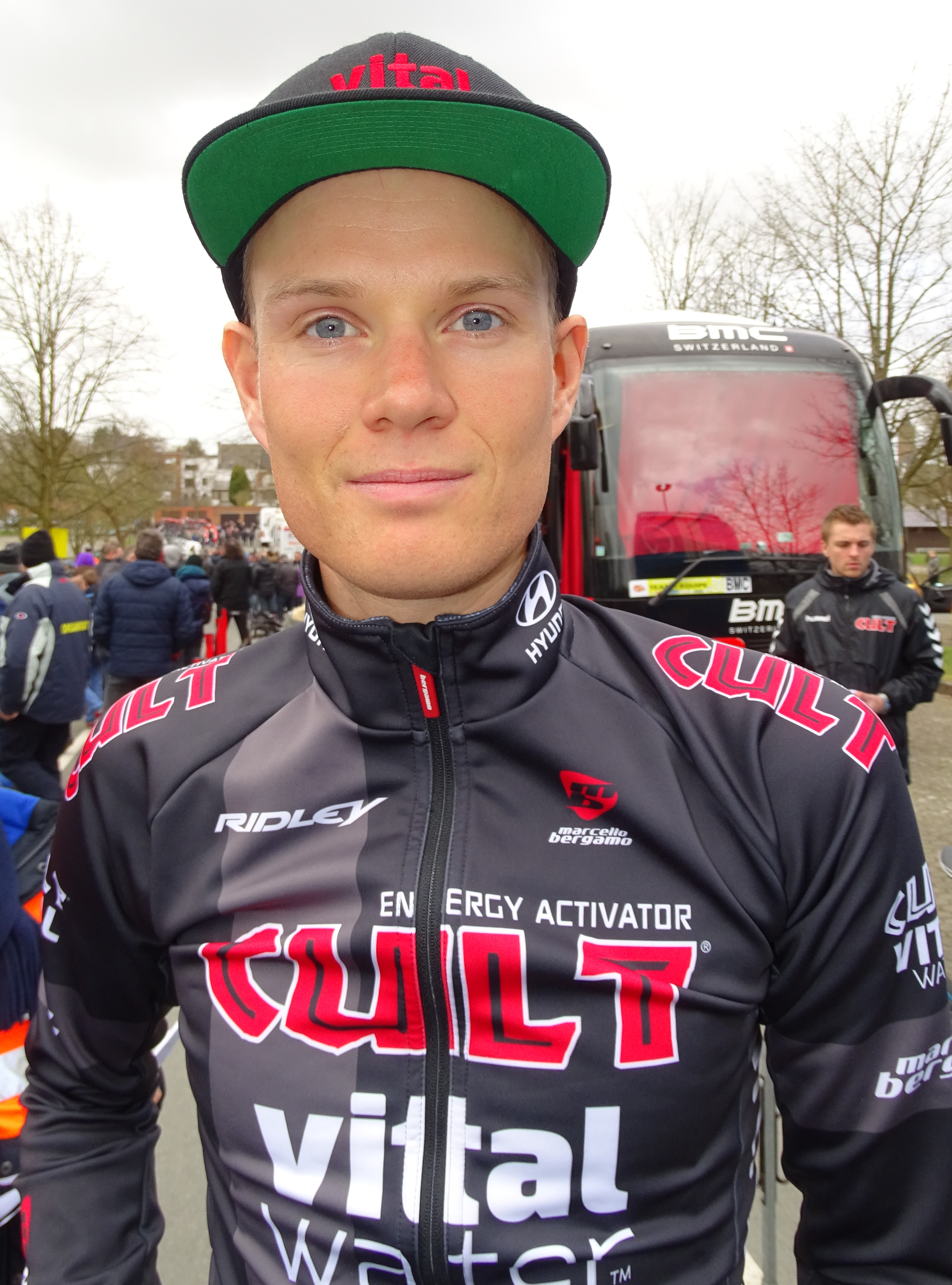 Reportage réalisé le mercredi 1er avril à l'occasion du départ de la deuxième étape des Trois jours de La Panne 2015 à Zottegem, Belgique.